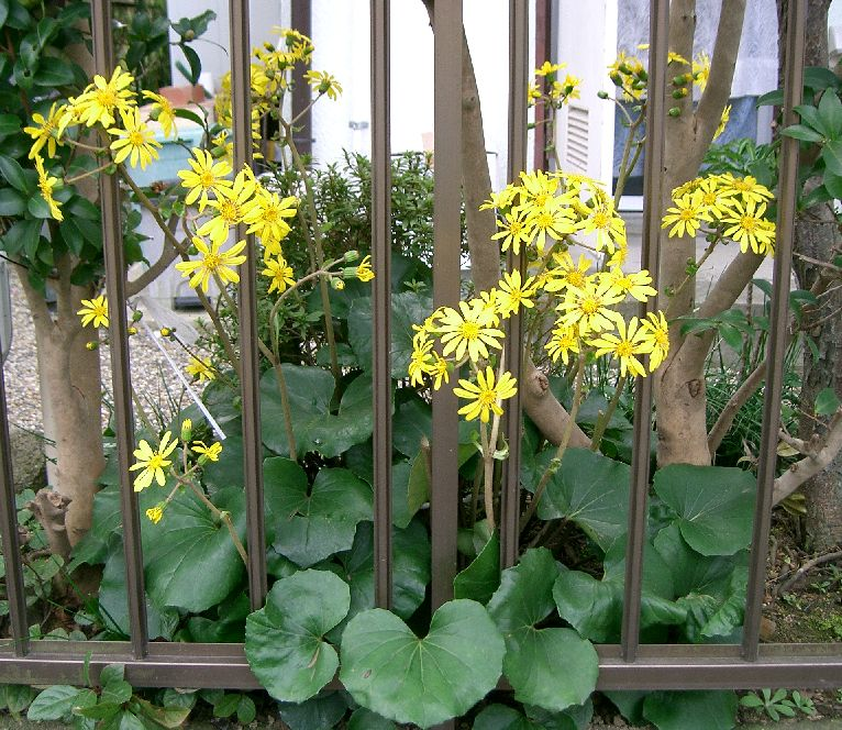 Farfugium japonicum